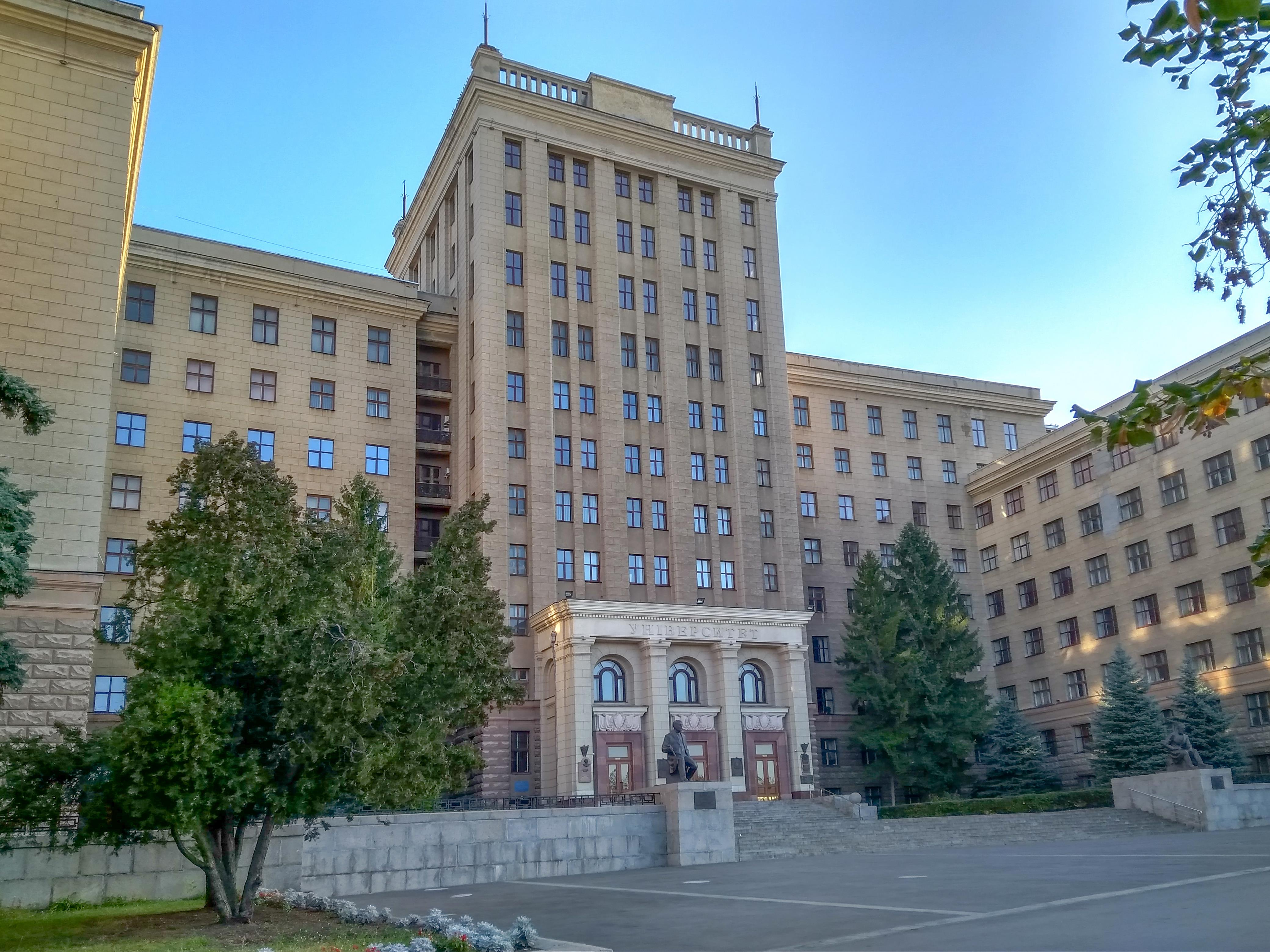 Корпус Харківського національного університету імені В. Н. Каразіна